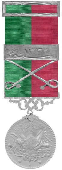 Turkse medaille 1882 - 1918 zilver met gesp.